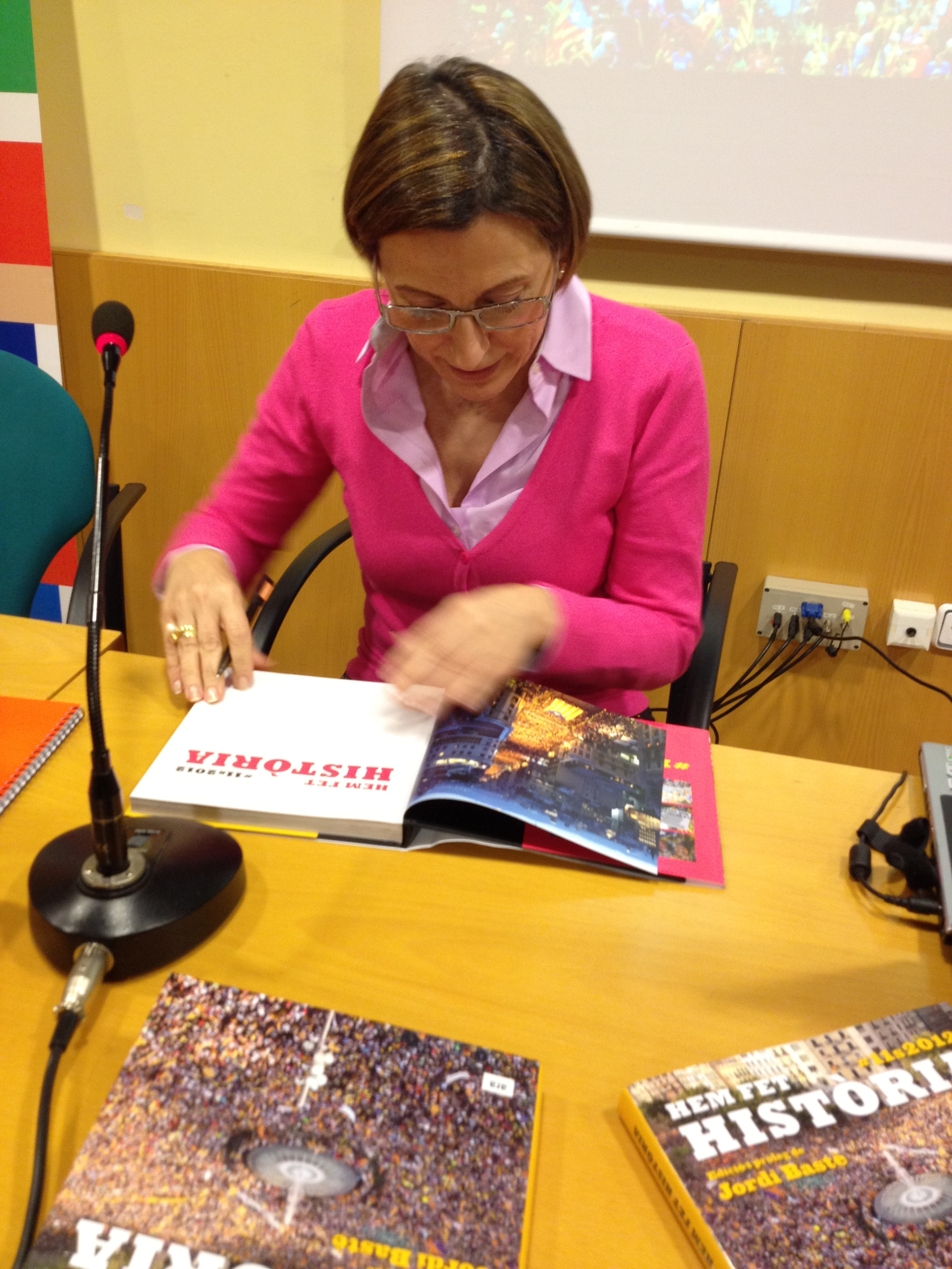 Carme Forcadell, presidenta de l'Assemblea Nacional de Catalunya el dia de la presentació del llibre "Hem fet història" a Barcelona. 18-12-2012